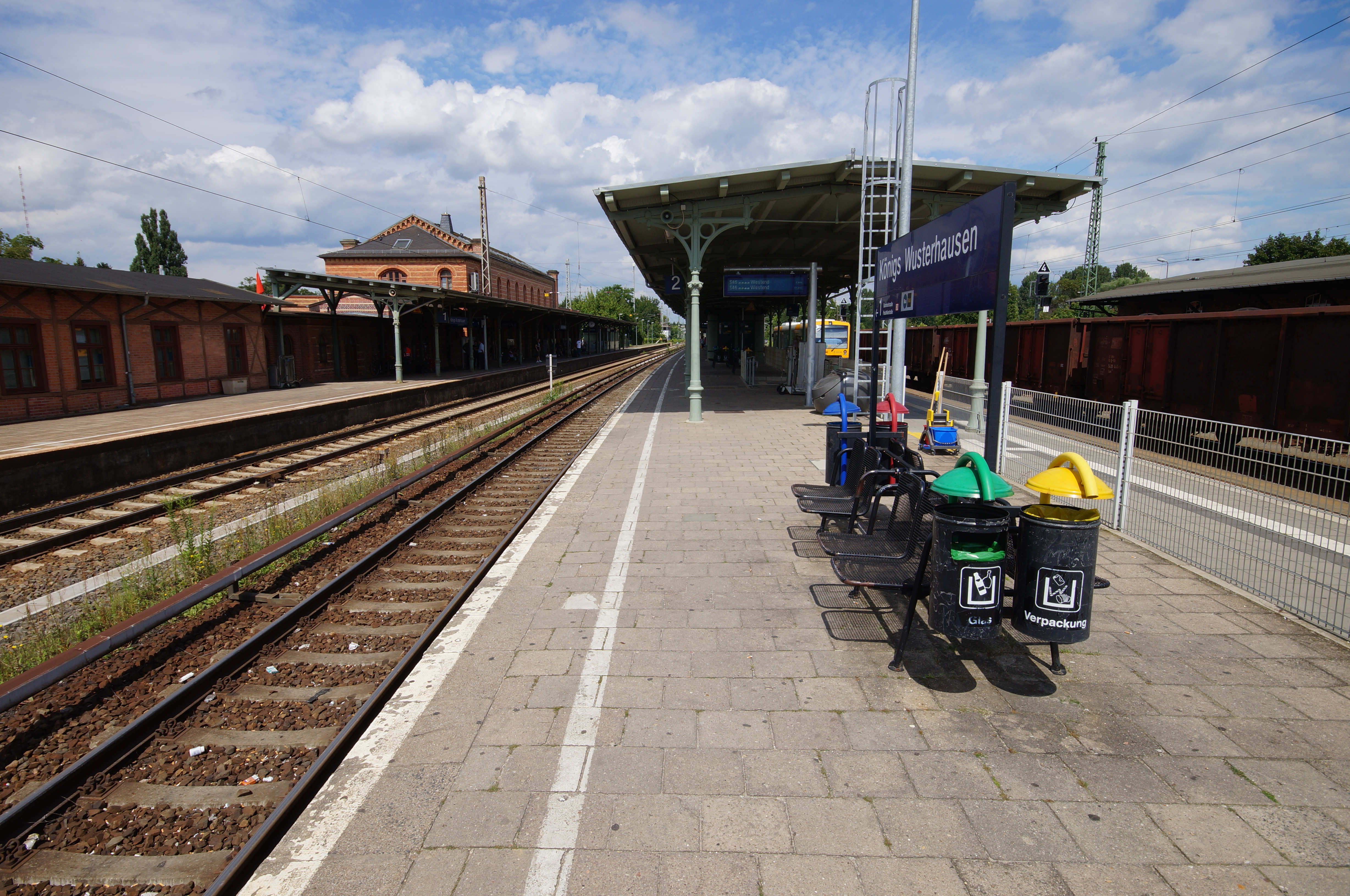 Die Bahnsteige des Bahnhofs Königs Wusterhausen